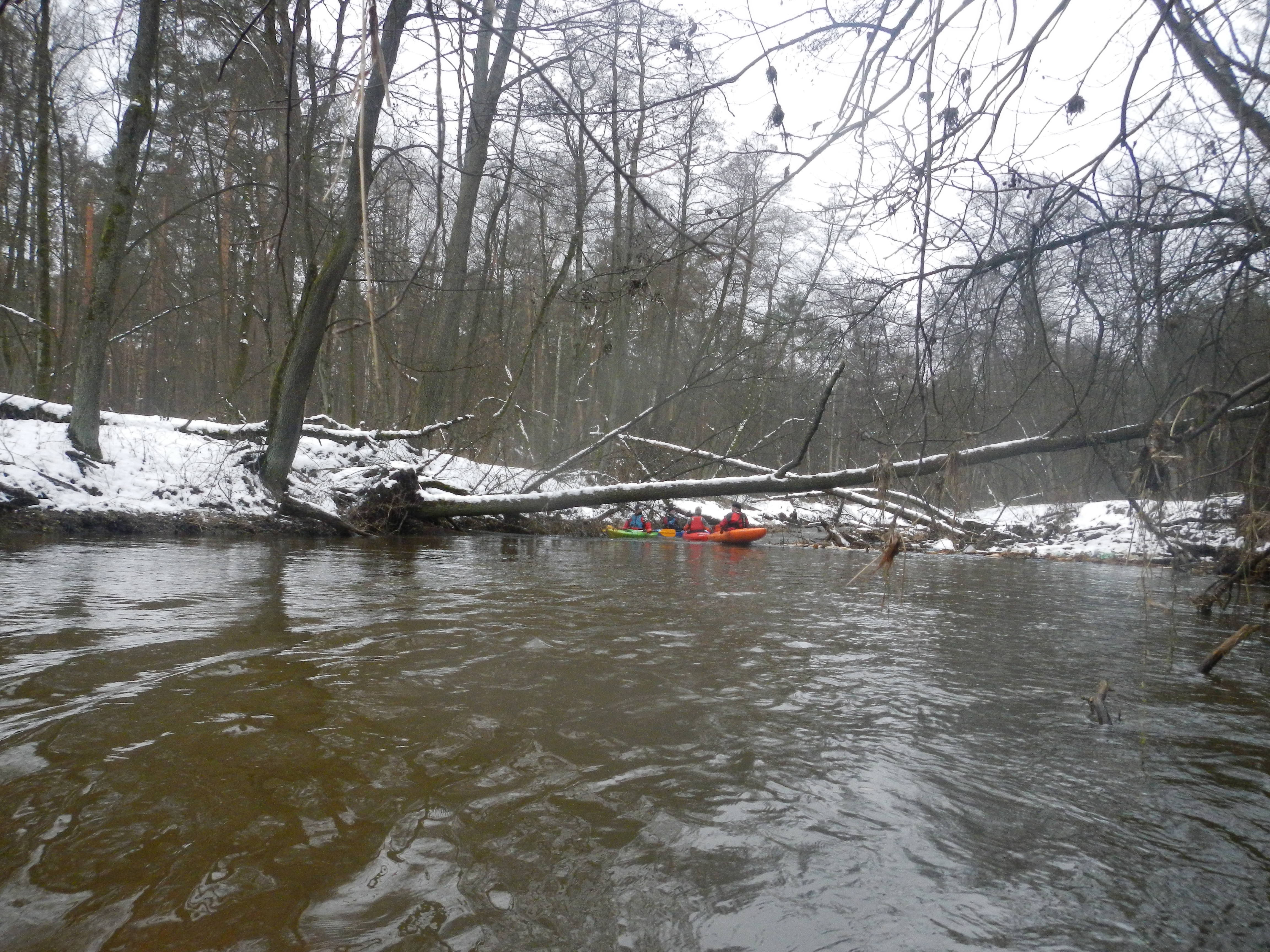 Gmina Wilga, Poland